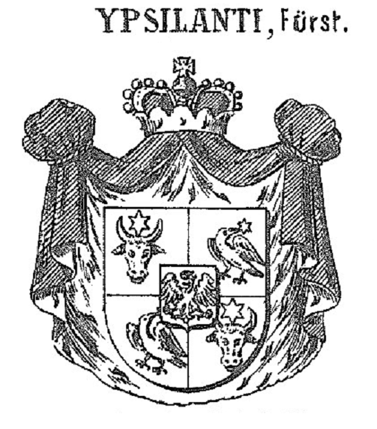 Wappen der Fürsten Ypsilanti.